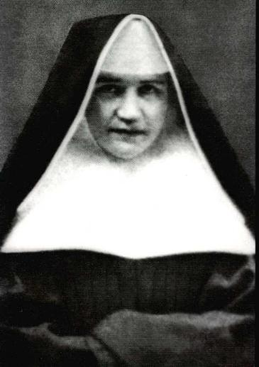 Schwester Blandine Merten (1883-1918), Selige der katholischen Kirche seit 1987